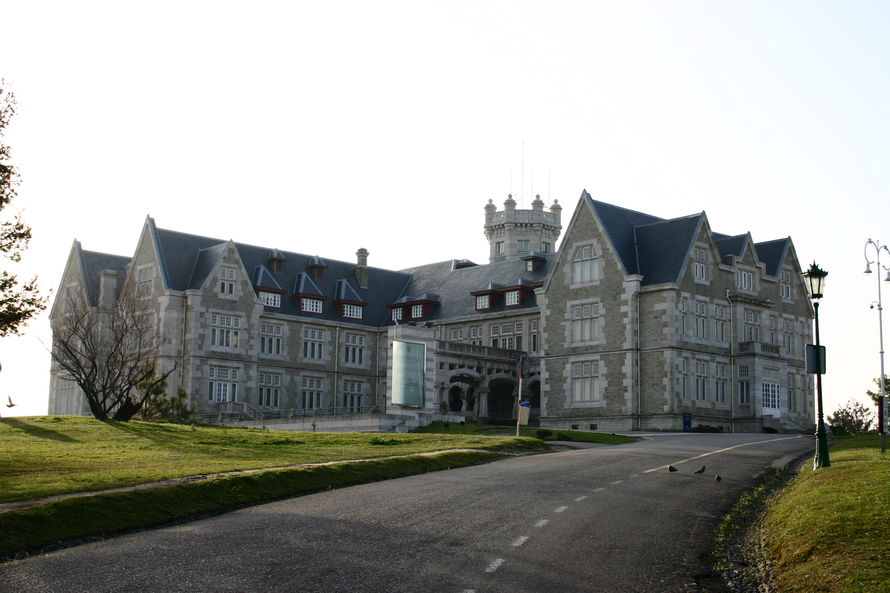 Exterior of the Palacio de la Magdalena